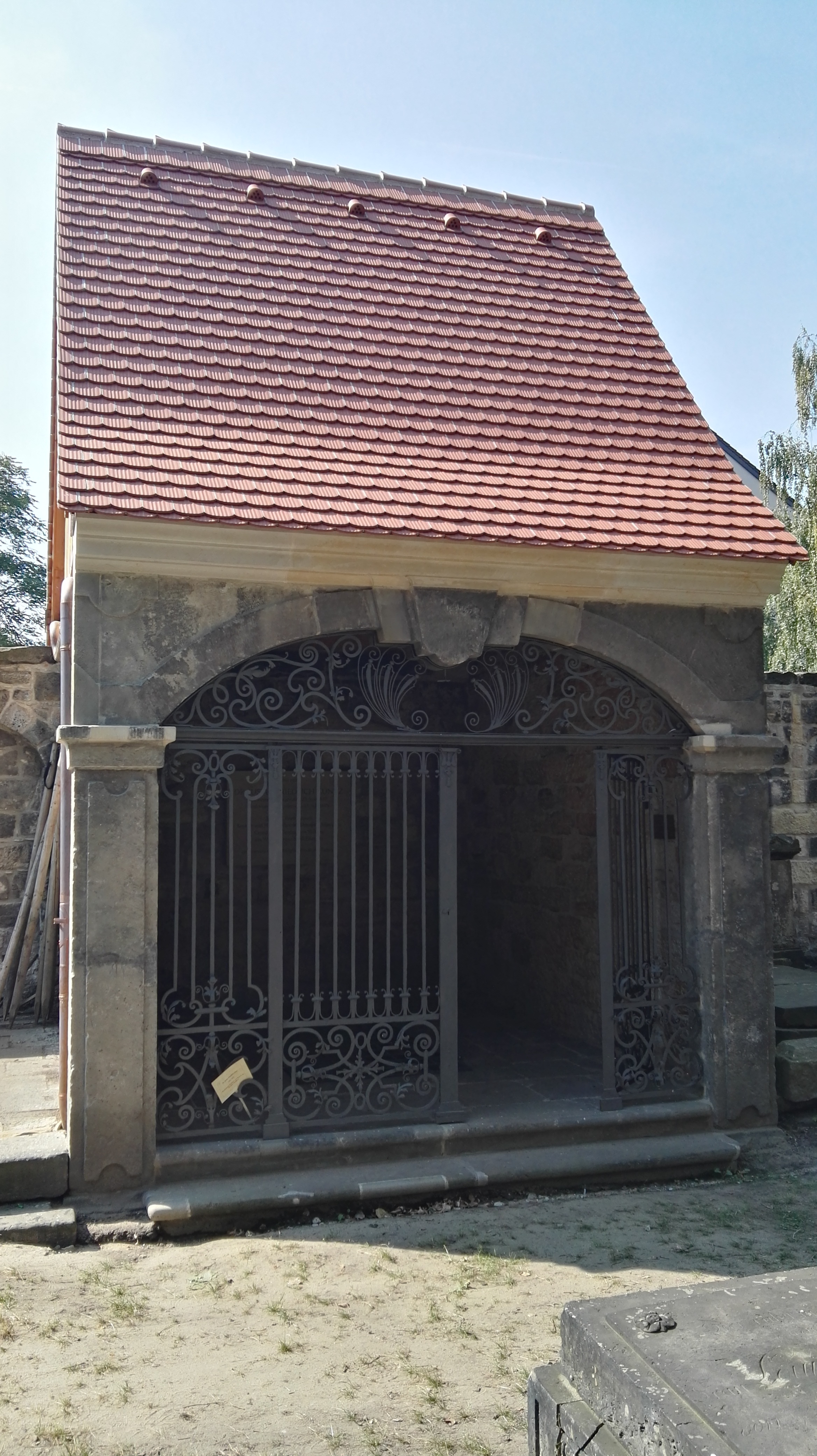 Denkmalgeschützter Eliasfriedhof in Dresden; wiederaufgebaute Güntzgruft